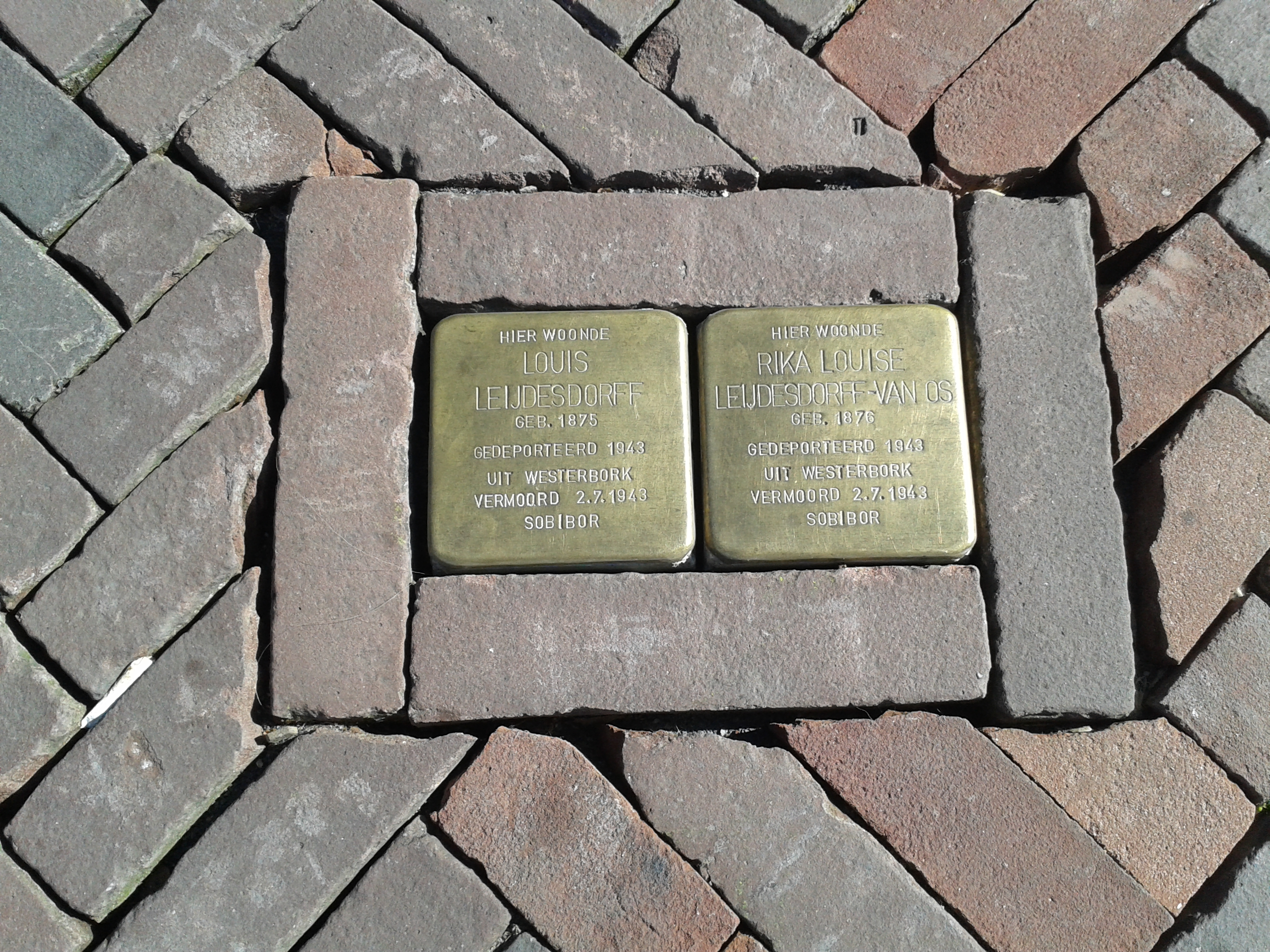 Stolpersteine Middelburg Markt 9